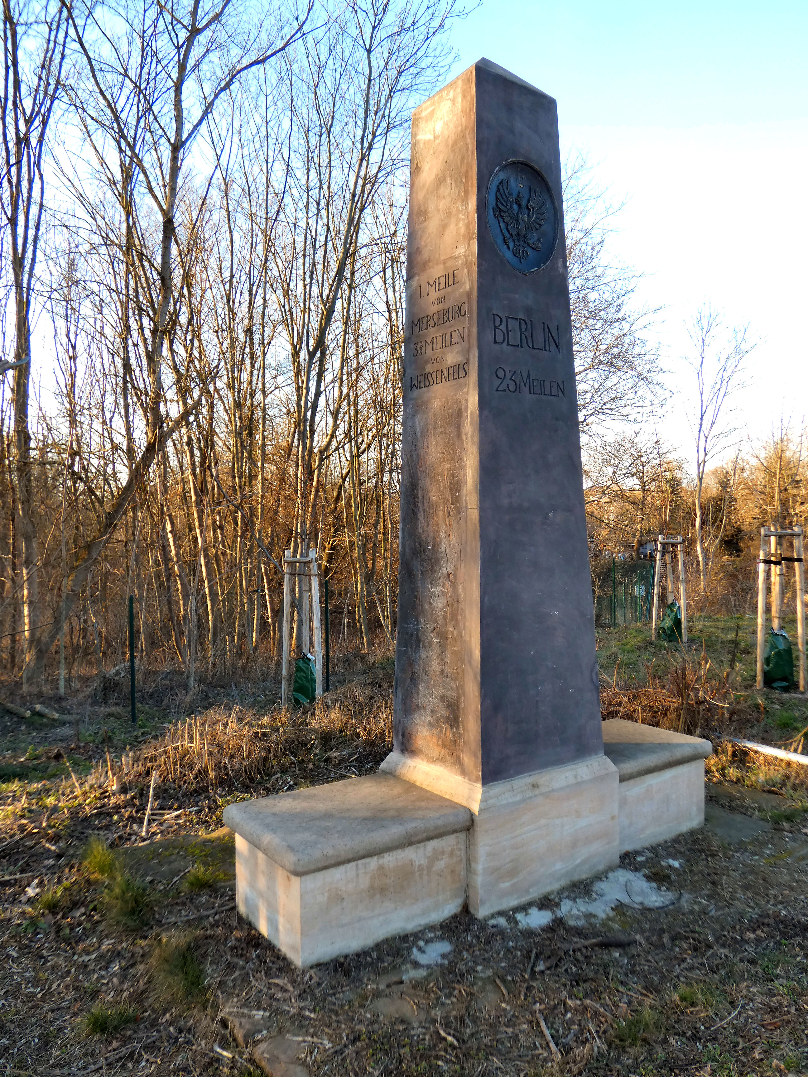 Preußischer Ganzmeilenobelisk, Halle-Ammendorf